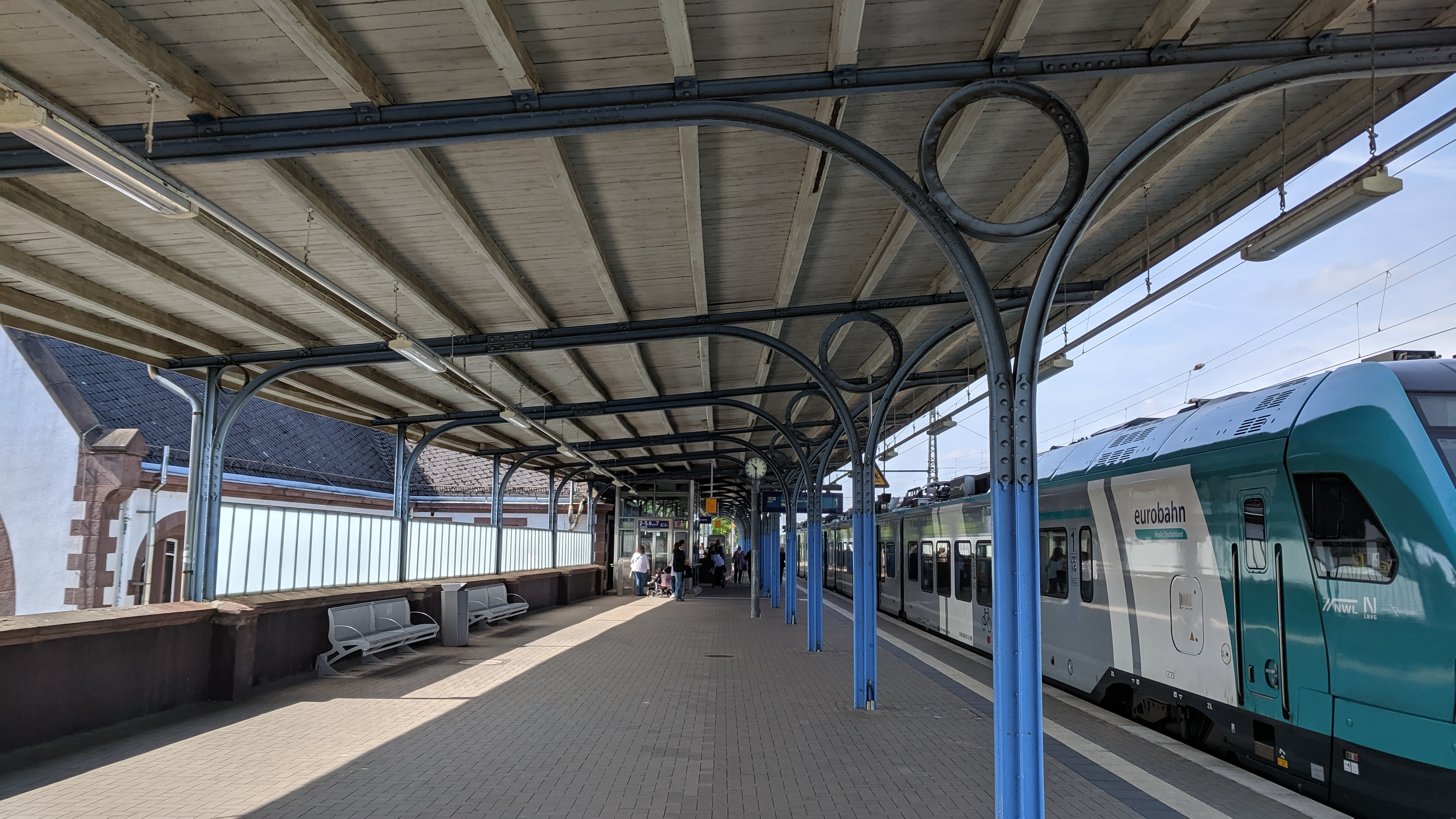 Bahnhof Herford, Historisches Bahnsteigdach am Bahnsteig Gleis 1, Taken on 1 June 2019